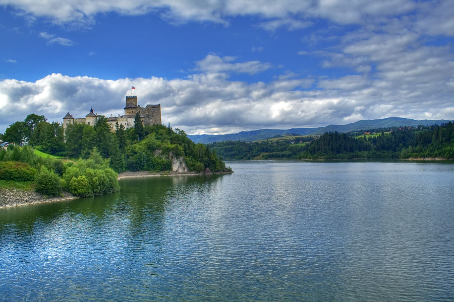 Zamek w Niedzicy